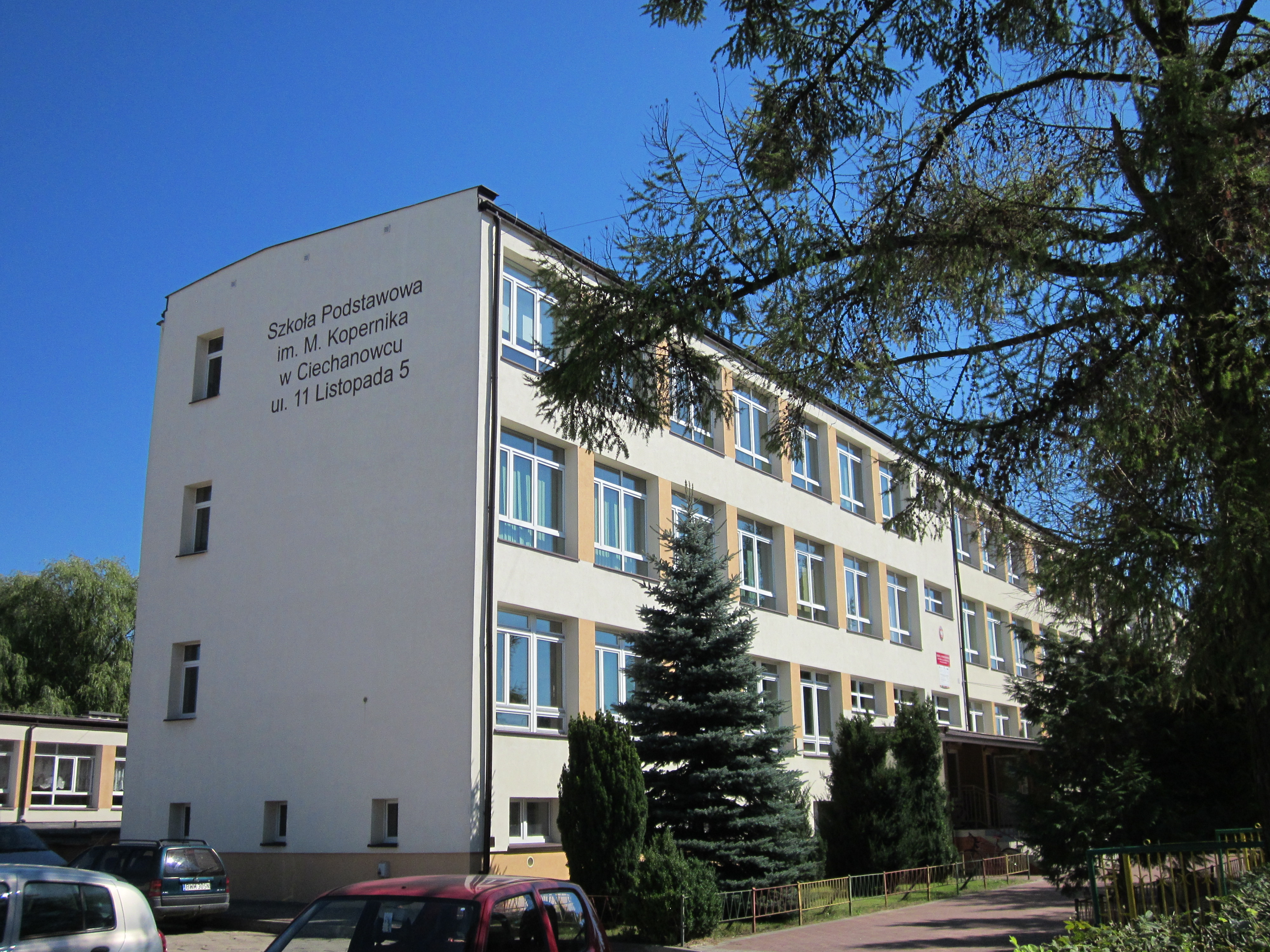 Szkoła Podstawowa im. M. Kopernika znajduje się przy ul. 11 Listopada 5.